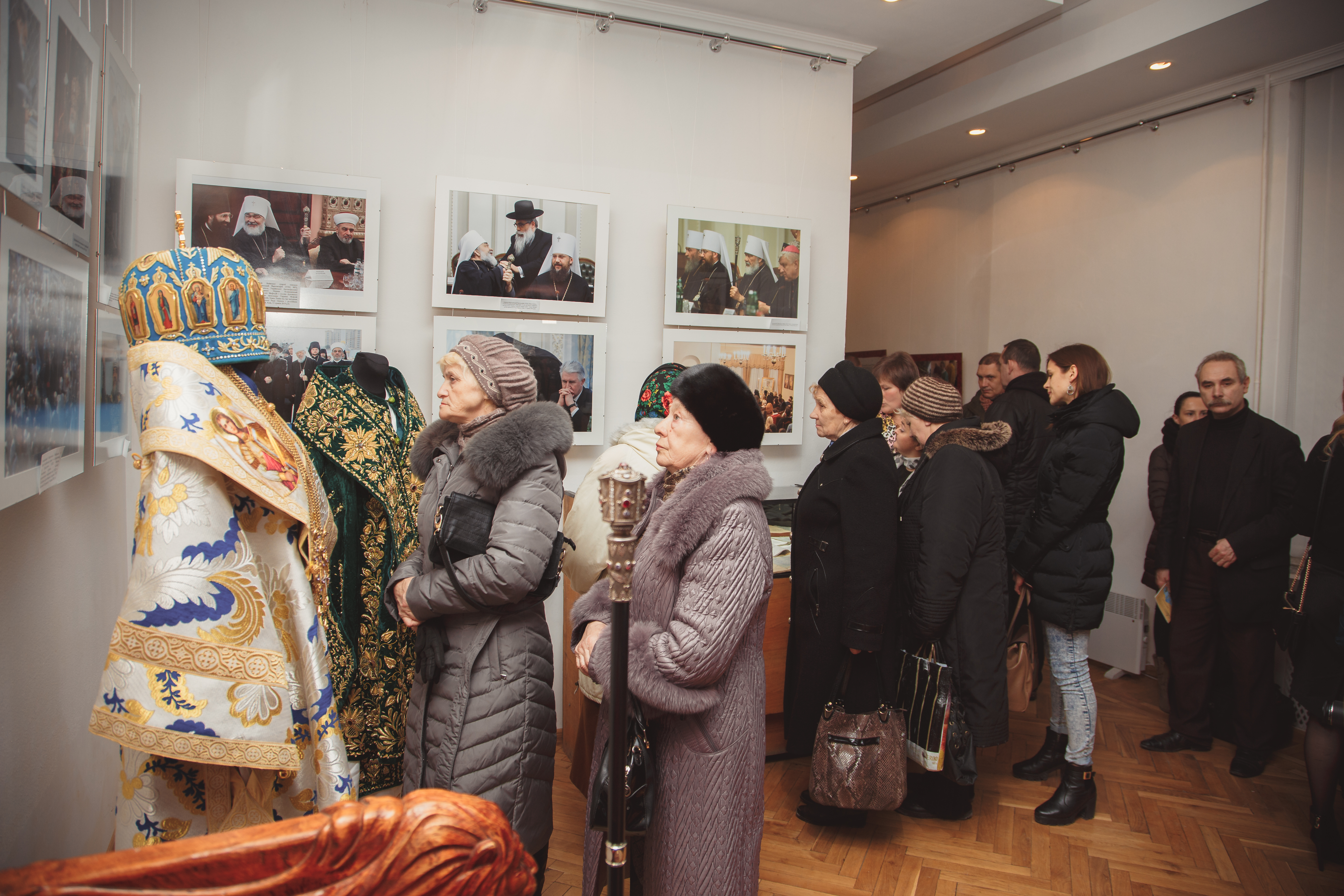 Тернопільський обласний краєзнавчий музей. Відкриття виставки пам’яті Блаженнішого Мефодія, митрополита Київського і всієї України, Предстоятеля Української автокефальної православної церкви, організованої Фондом пам`яті Блаженнішого Митрополита Мефодія